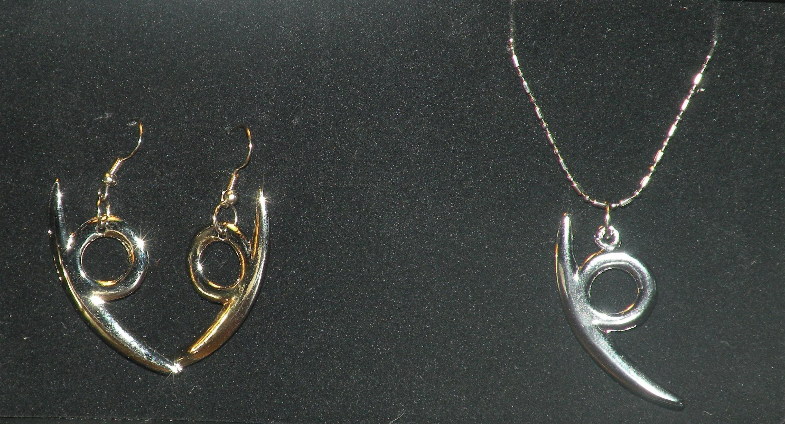 boucles d'oreilles et pendentif d'orochimaru